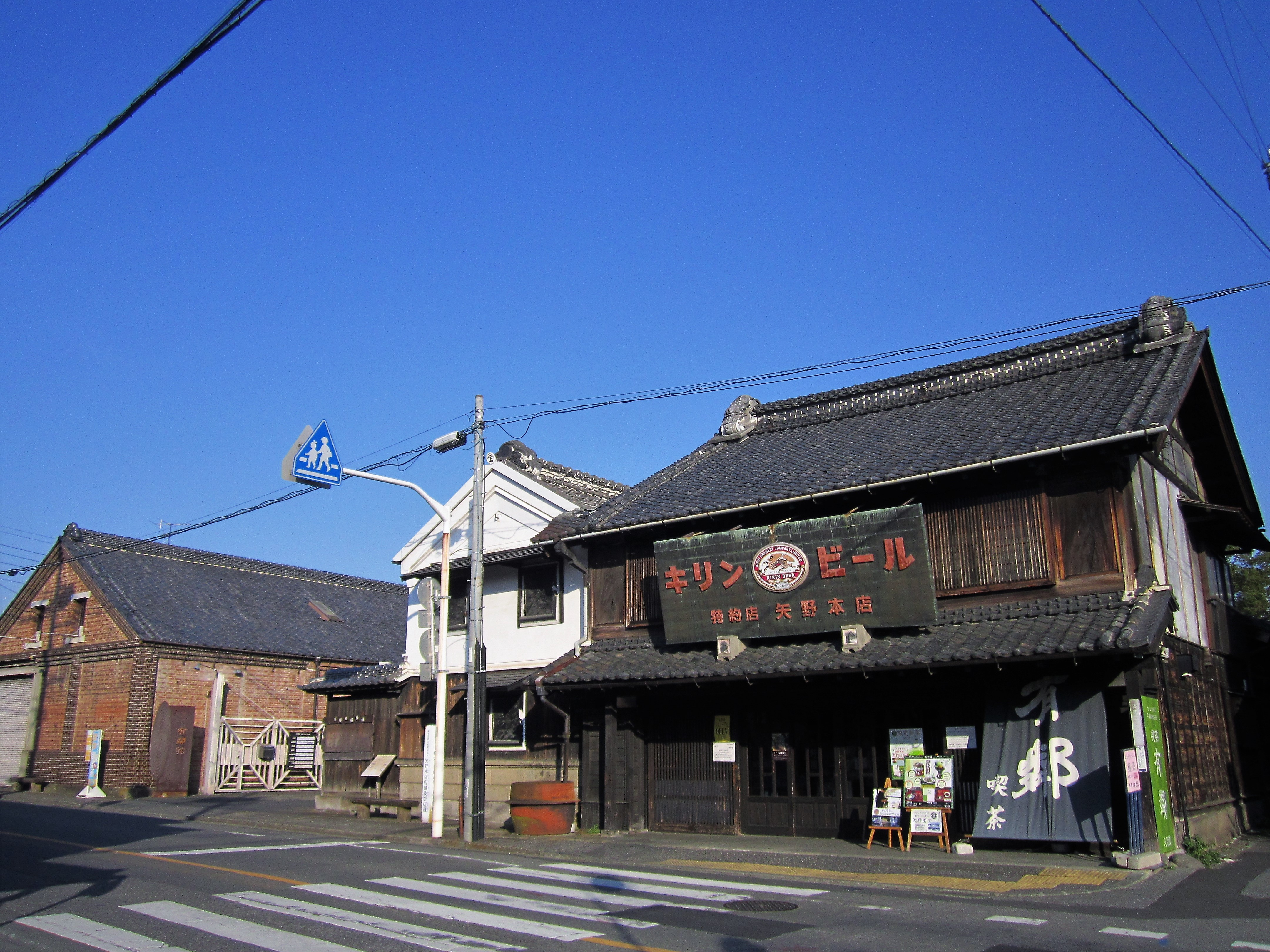 矢野本店・有鄰館（桐生新町 重要伝統的建造物群保存地区） Canon PowerShot A2200